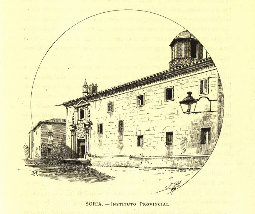 Soria. Instituto Provincial.